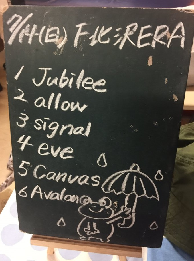 amiinAセトリボード